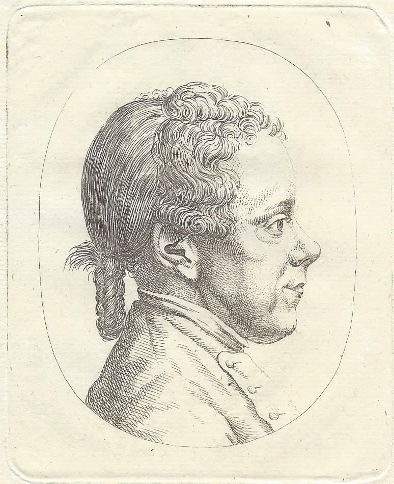 Peter im Baumgarten im Hessischen Rock. Kupferstichvignette von Georg Friedrich Schmoll, Frühjahr 1776.